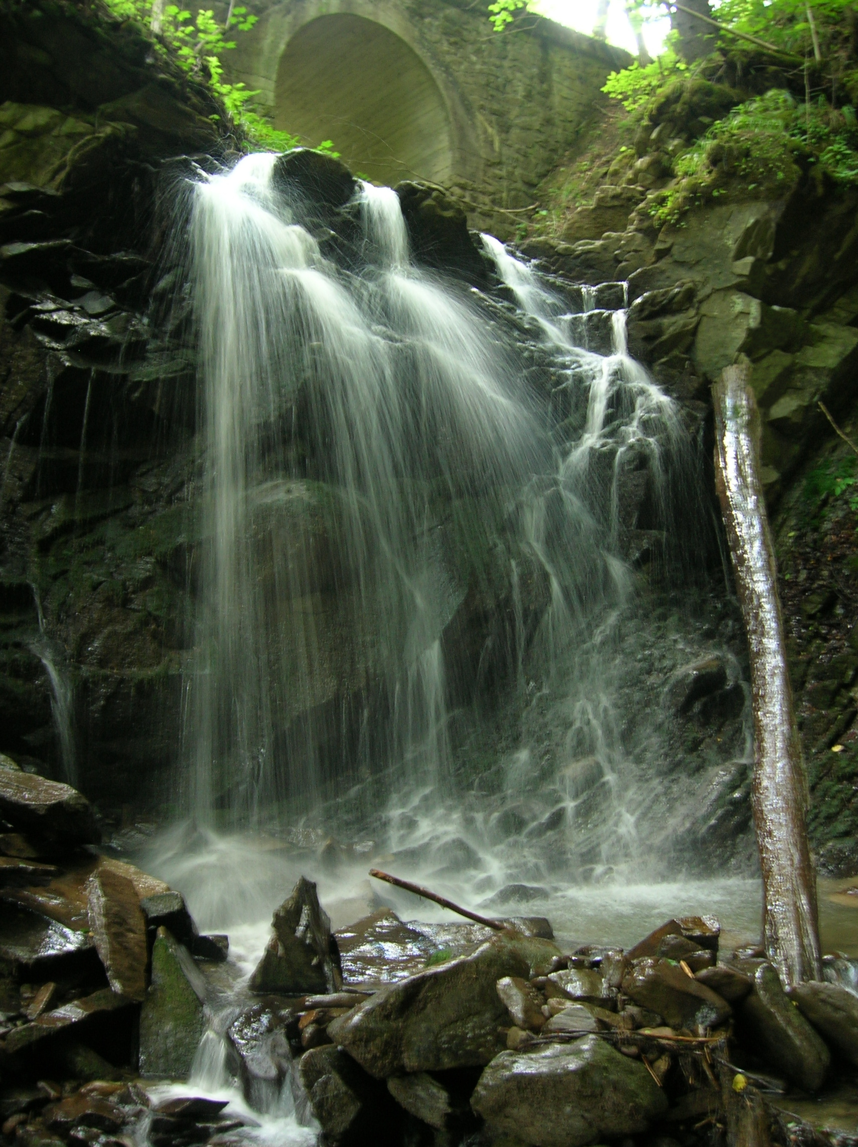 Cascada situată pe pârâul Frasin se găseşte lângă cătunul Lunca Cheii, pe partea stîngă a văii Tarcăului